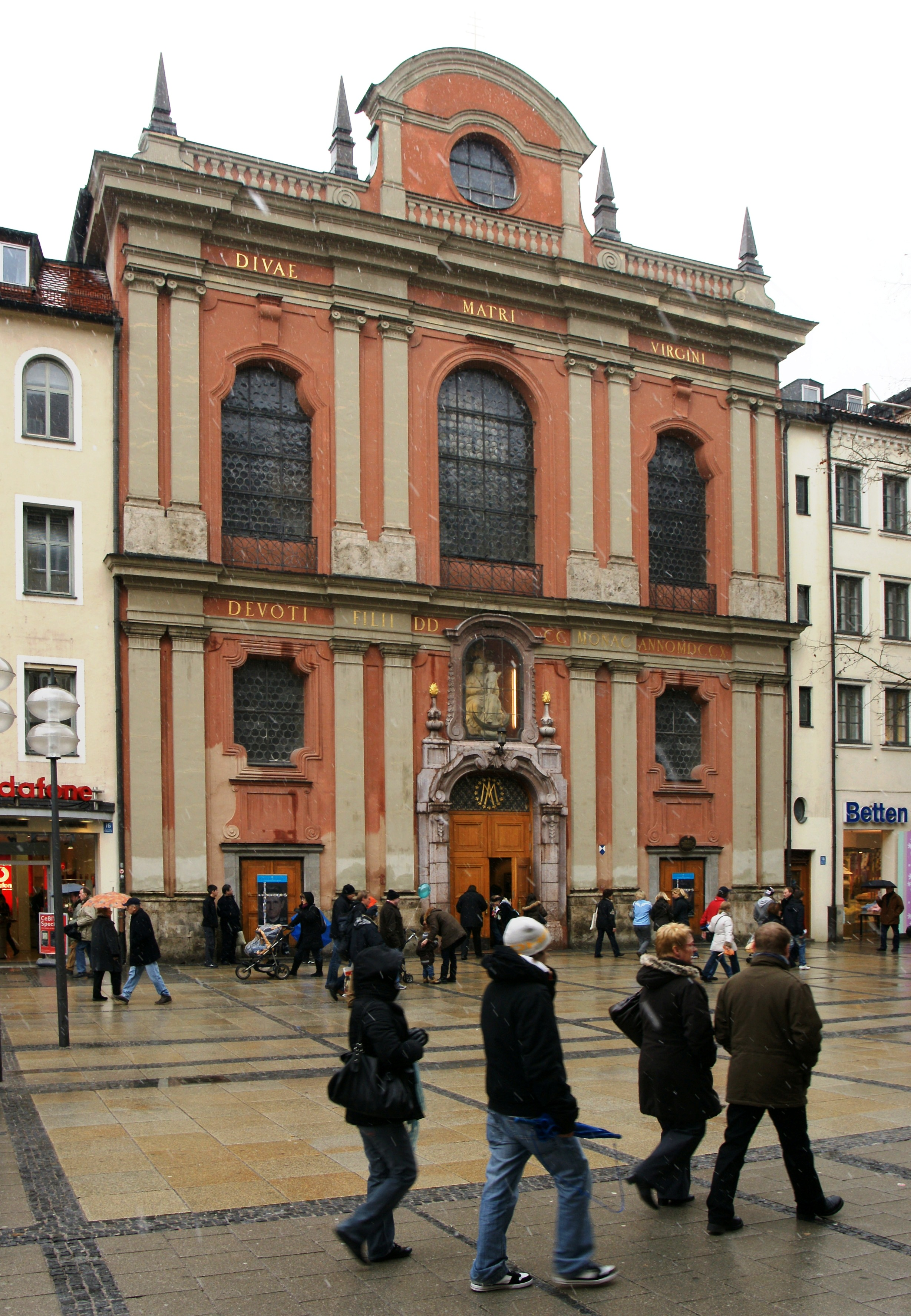 Der Bürgersaal in München, seit der Weihe des Hochaltars am 13. Mai 1778 inoffiziell auch "Bürgersaalkirche" genannt, ist der Bet- und Versammlungssaal der Marianischen Männerkongregation »Mariä Verkündigung« am Bürgersaal zu München. Er wurde 1709/10 nach Plänen von Giovanni Antonio Viscardi erbaut. Seit 1778 wird der Saal als Kirche genutzt.